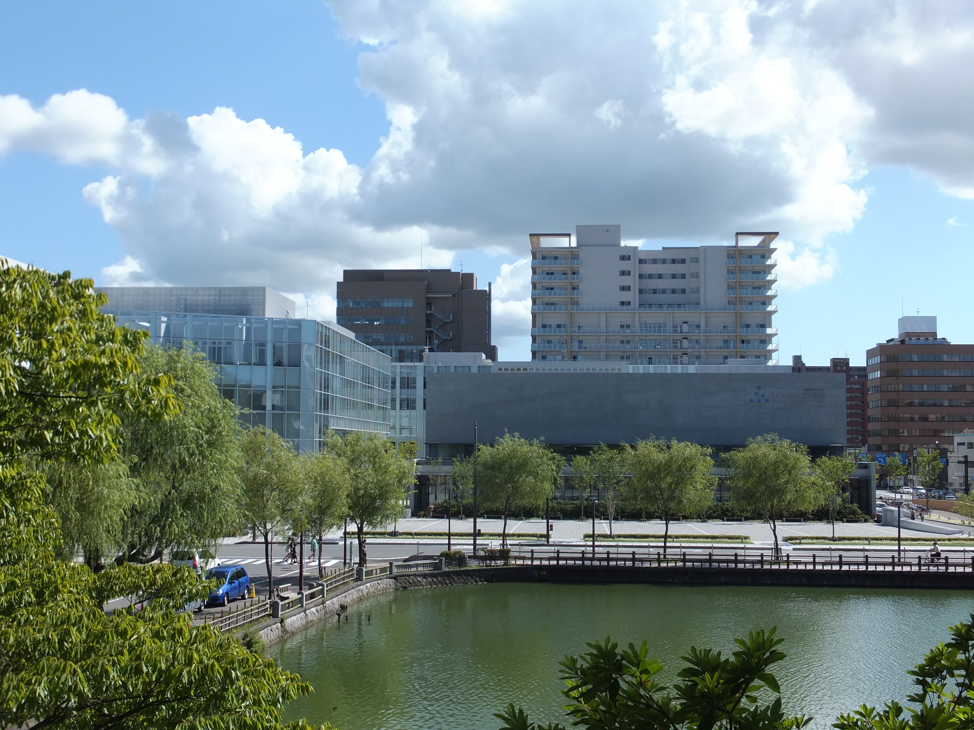 秋田県民会館の土手から見たエリアなかいち施設全景。